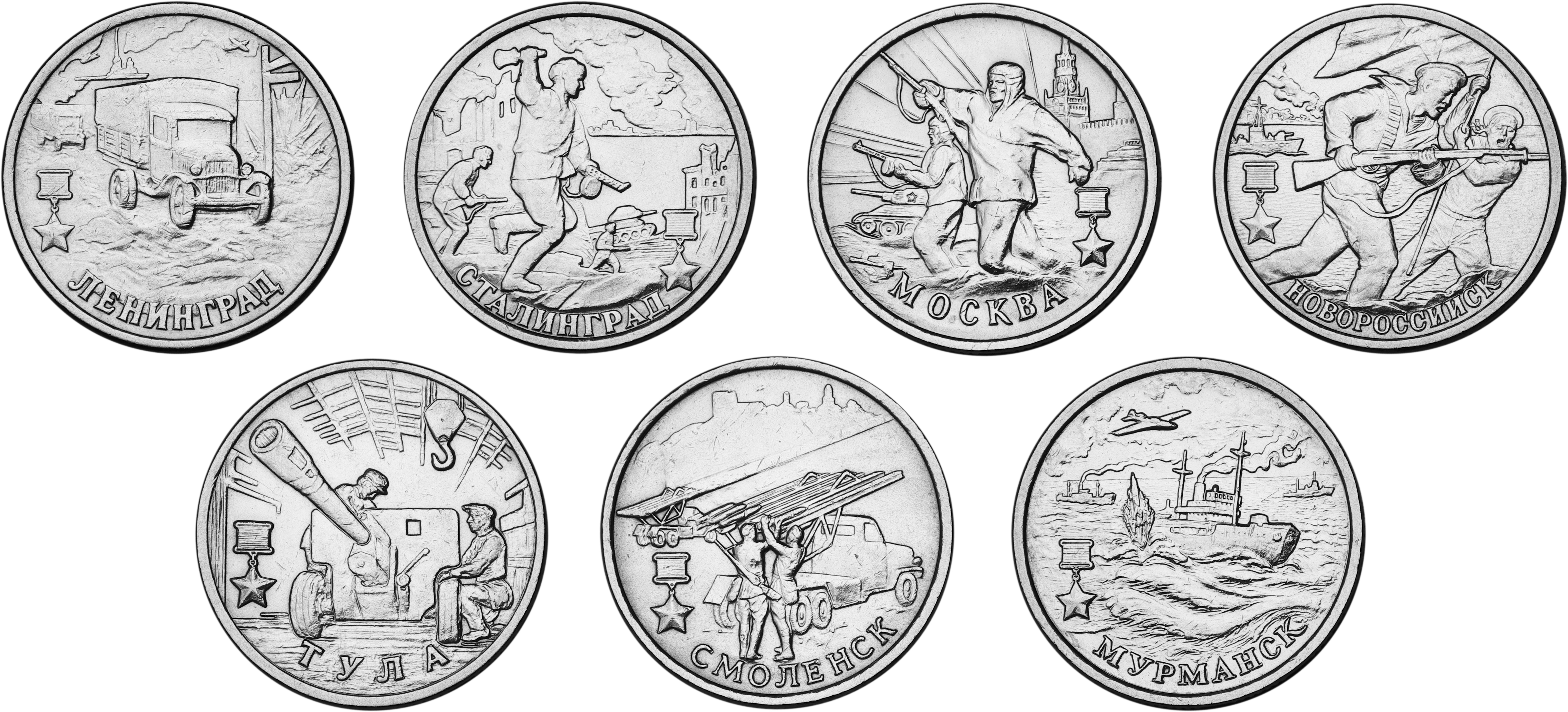 Изображение 2-рублёвых монет серии «Города-герои».